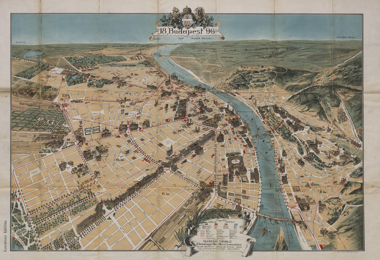 Budapest tervrajza, 1896 - Az ezredéves országos kiállítás látképe